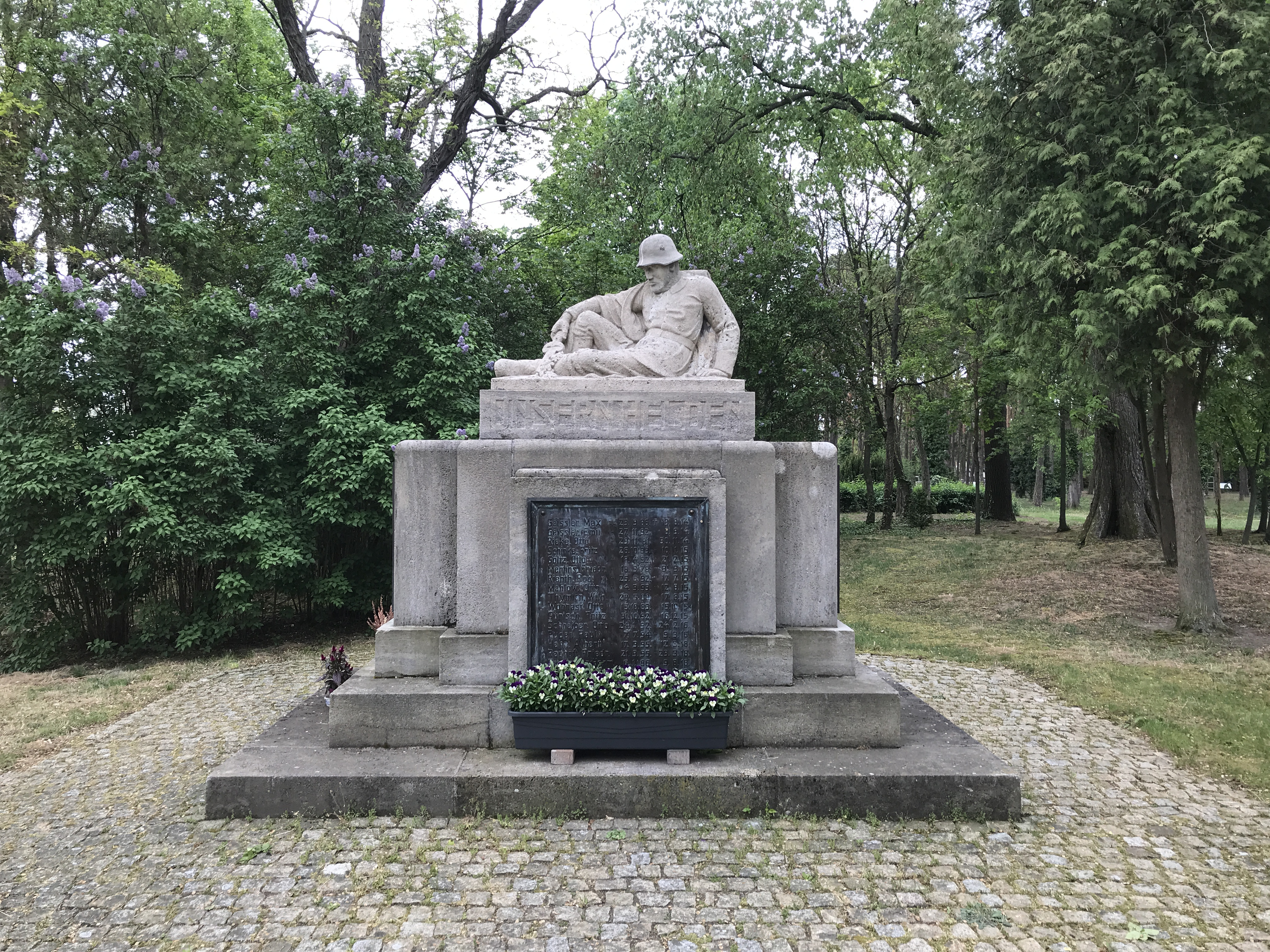 Kallinchen, ein Ortsteil der Stadt Zossen im Land Brandenburg